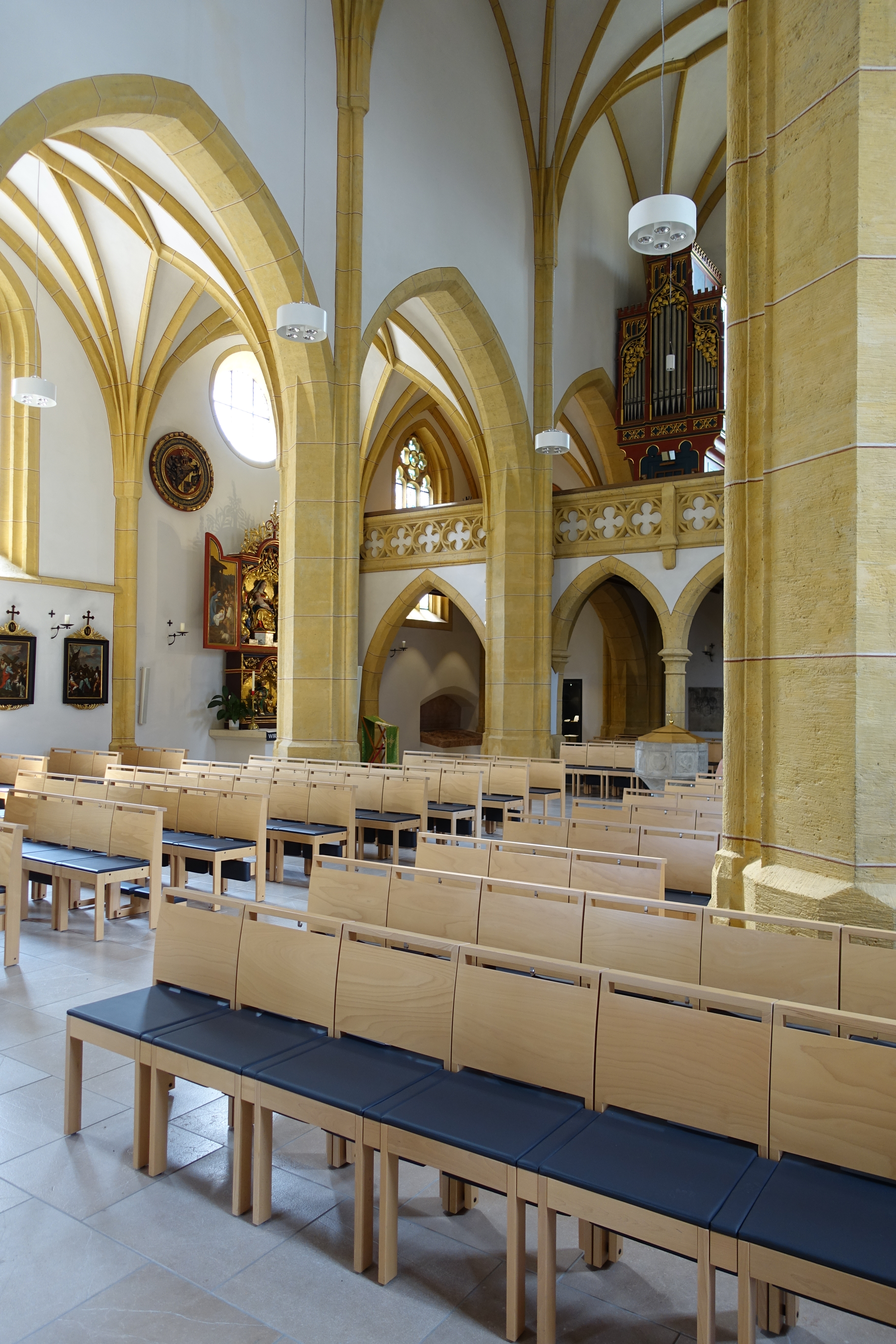 Landeck, Tirol, Österreich. Katholische Pfarrkirche Mariä Himmelfahrt, Innenraum in Richtung Südwest